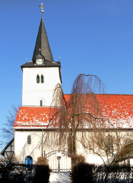 St. Nikolai-Kirche Bad Sachsa